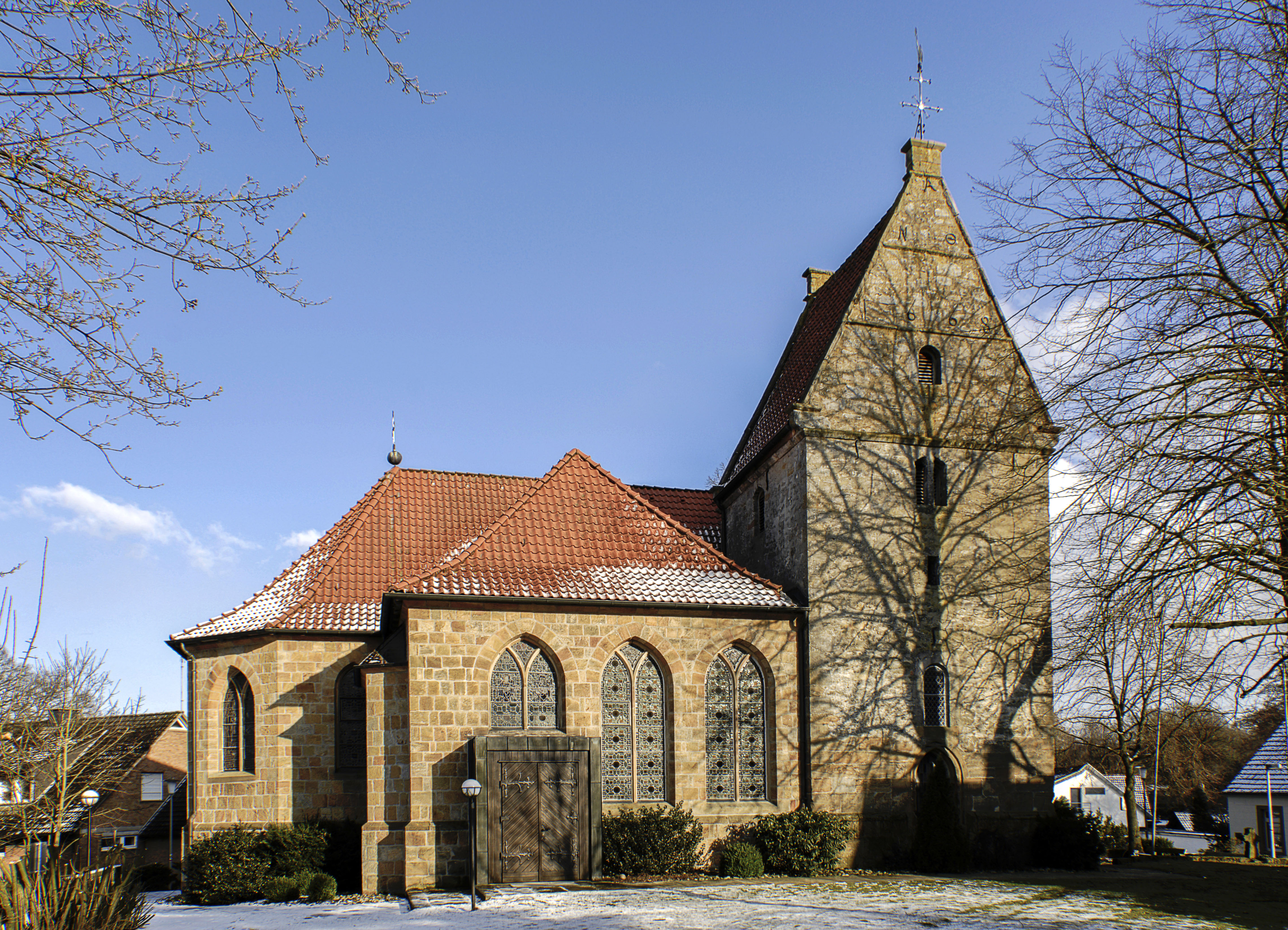 Elte, St. Ludgerus, Westseite